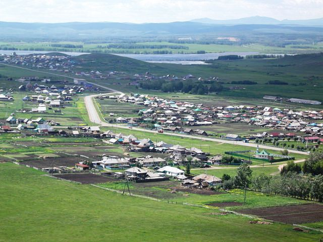 Башҡортса: Учалы районы, Ҡунаҡбай ауылы